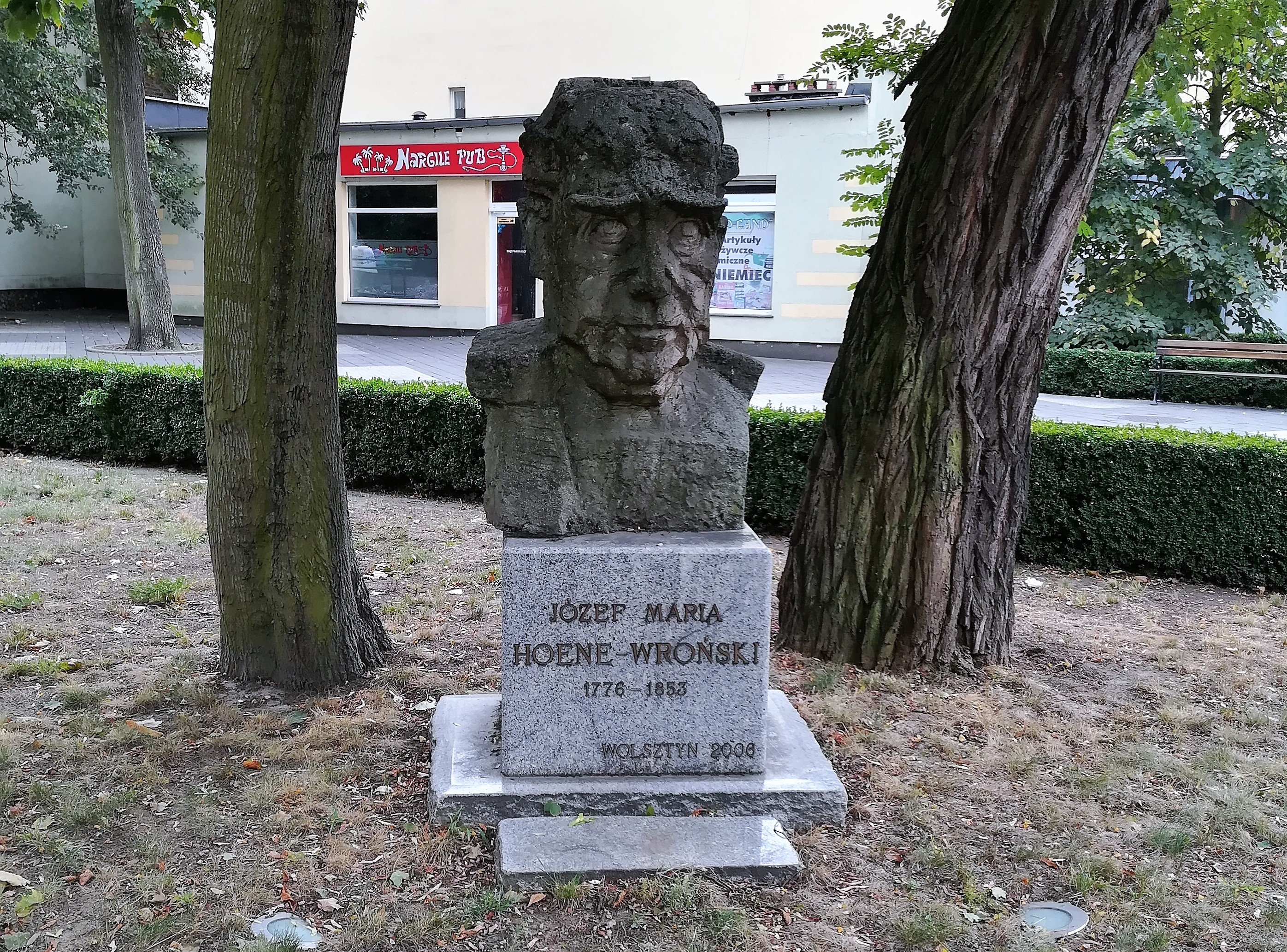 Pomnik Józefa Hoene-Wrońskiego w Wolsztynie.